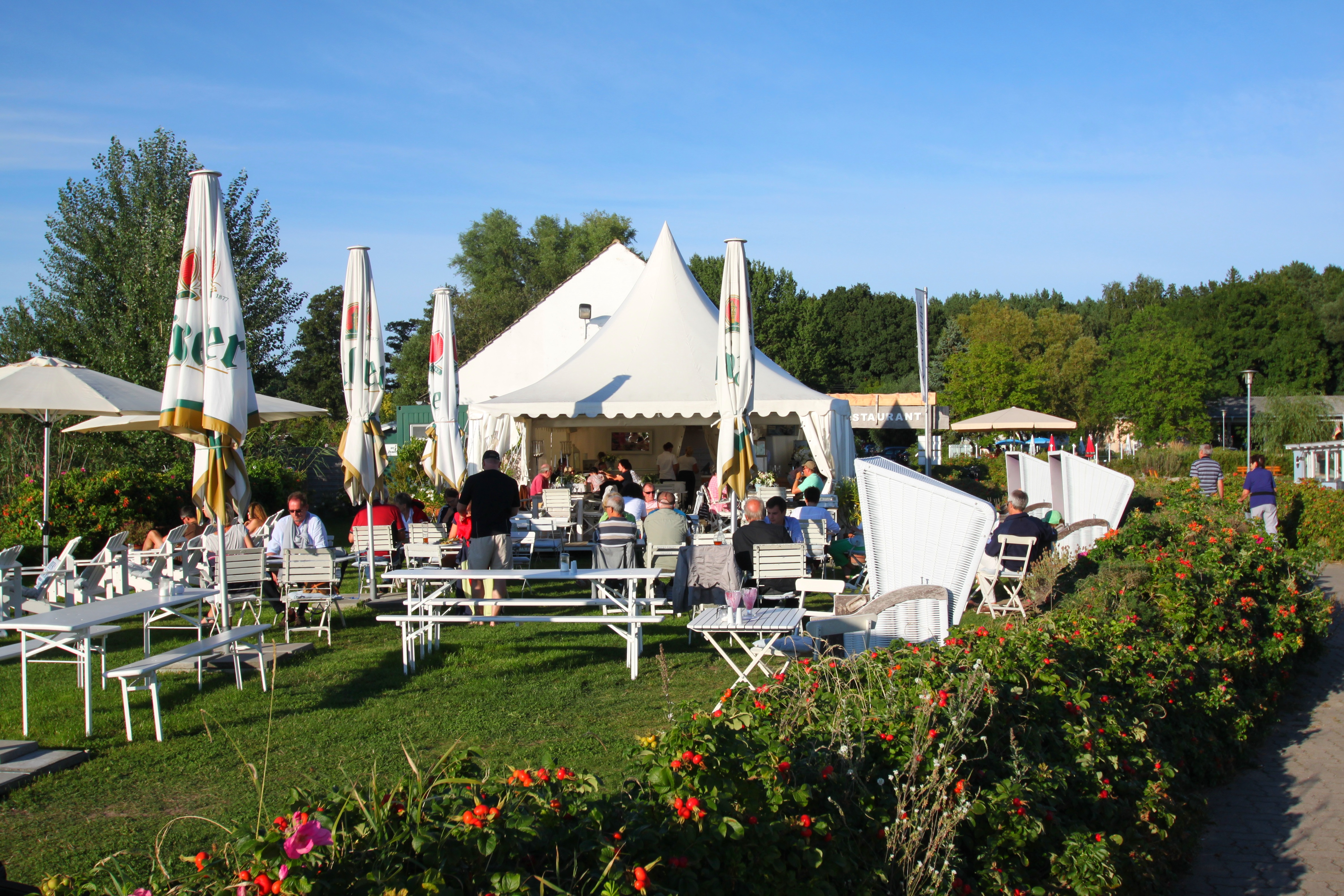 Sommercafé Hafen Rankwitz